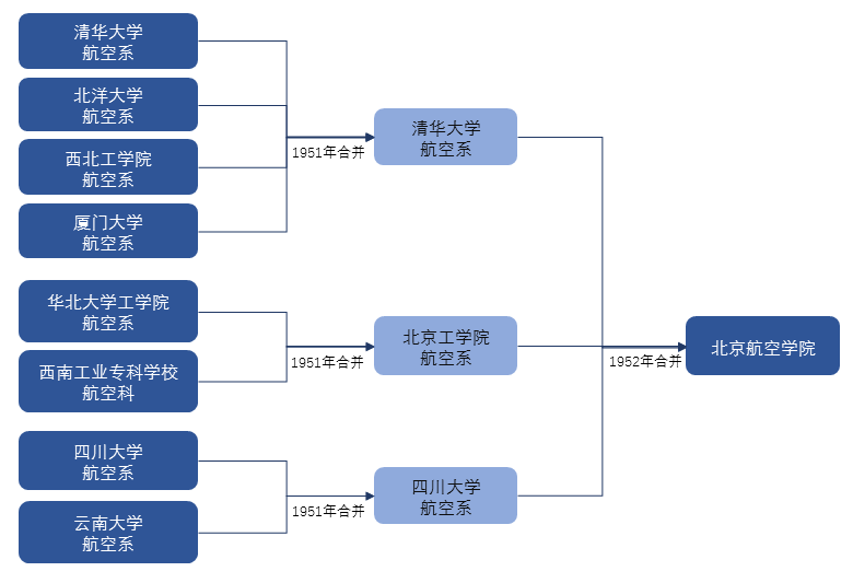 北航建校过程